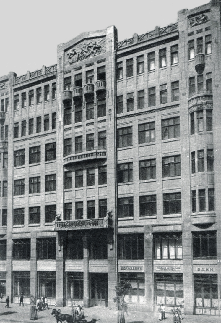 Будинок на Хрещатику, Київ, вул. Хрещатик, 6